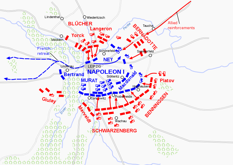 Völkerschlacht bei Leipzig: Plan der Truppenaufstellung und Aktionen am 18. Oktober 1813